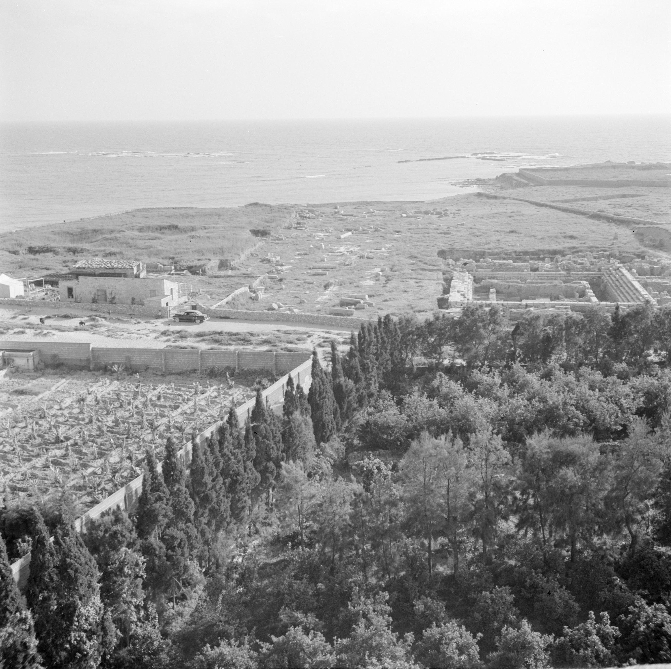 Collectie / Archief : Fotocollectie Van de Poll Reportage / Serie : Midden-Oosten 1950-1955: Libanon Beschrijving : Het strand, de Middellandse Zee en een Phoenisisch necropolis nabij Tyrus Datum : 1950 Locatie : Libanon, Tyrus Trefwoorden : begraafplaatsen, stranden, zeeën Fotograaf : Poll, Willem van de Auteursrechthebbende : Nationaal Archief Materiaalsoort : Negatief (zwart/wit) Nummer archiefinventaris : bekijk toegang 2.24.14.02 Bestanddeelnummer : 255-6312